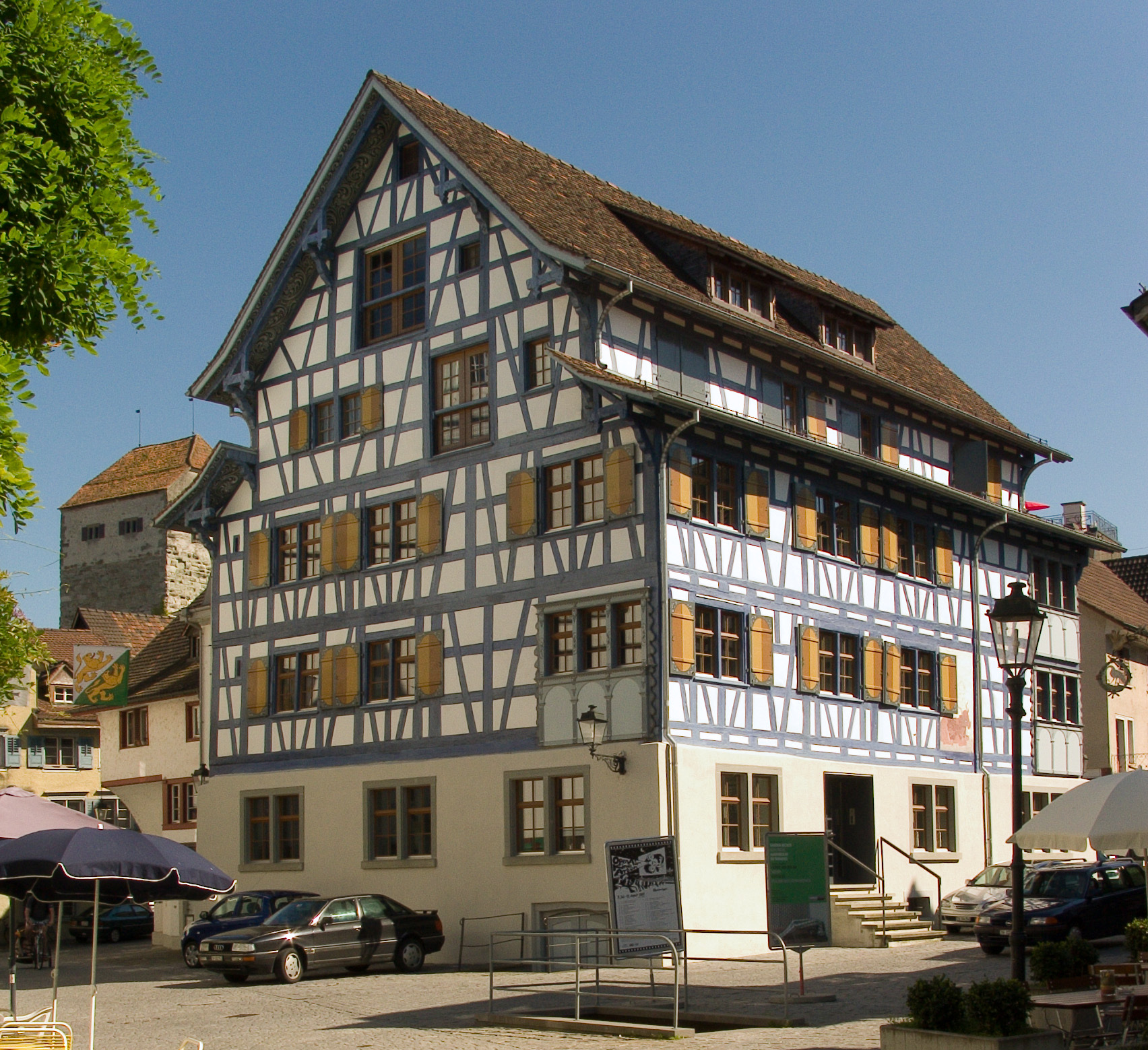 Ehemaliges Gasthaus Ochsen